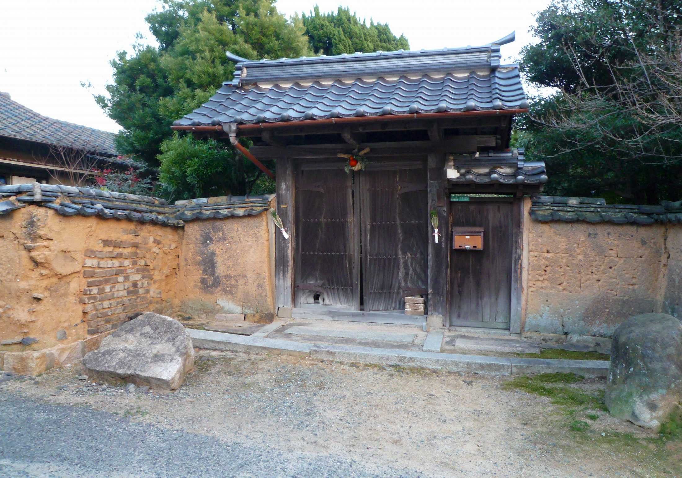 白石正一郎邸浜門